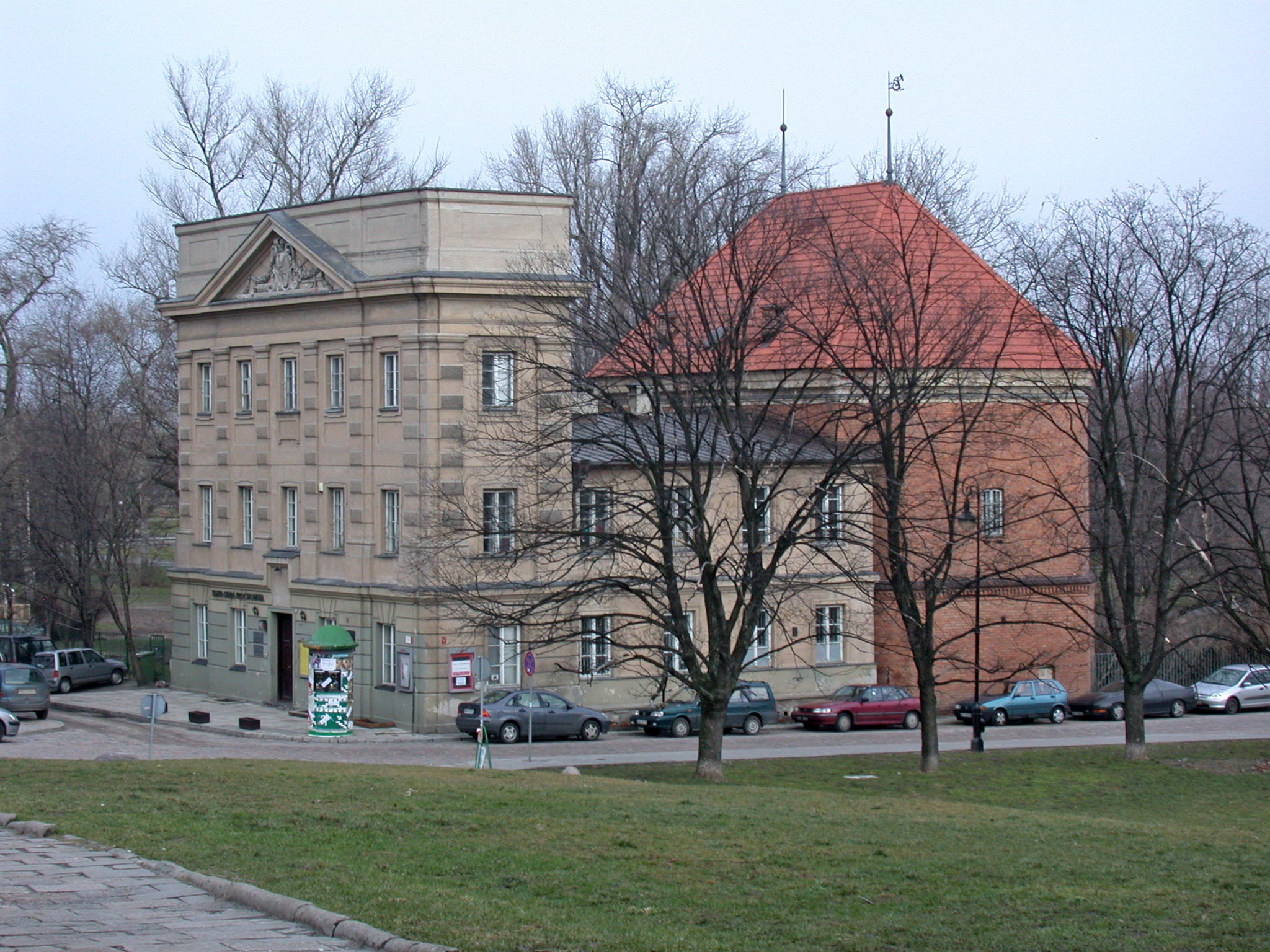 Varsavia, Vecchia Polveriera (Stara Prochownia) nella Città Nuova (Nowego Miasto).